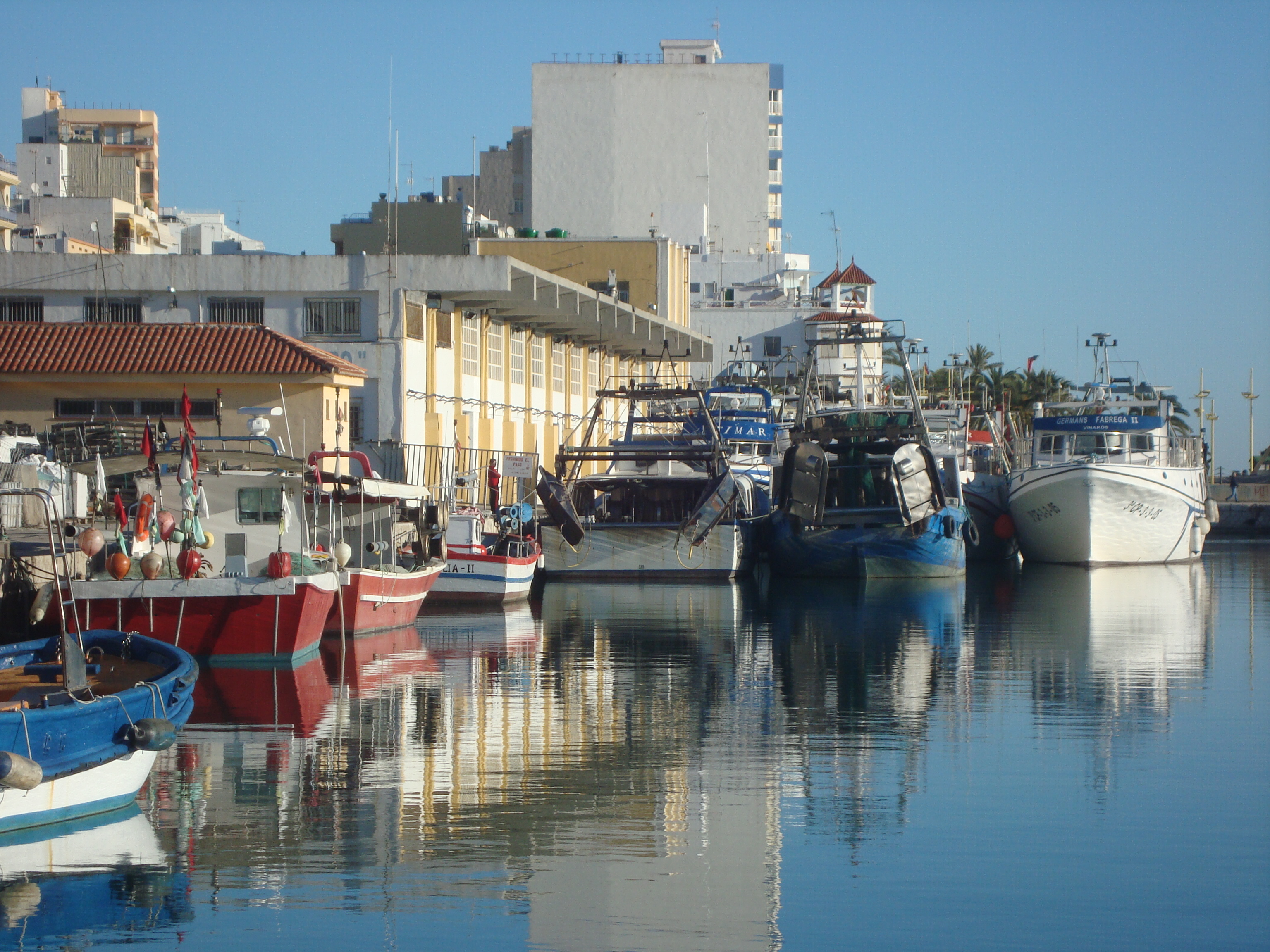 Port de Vinaròs 03.138-031.